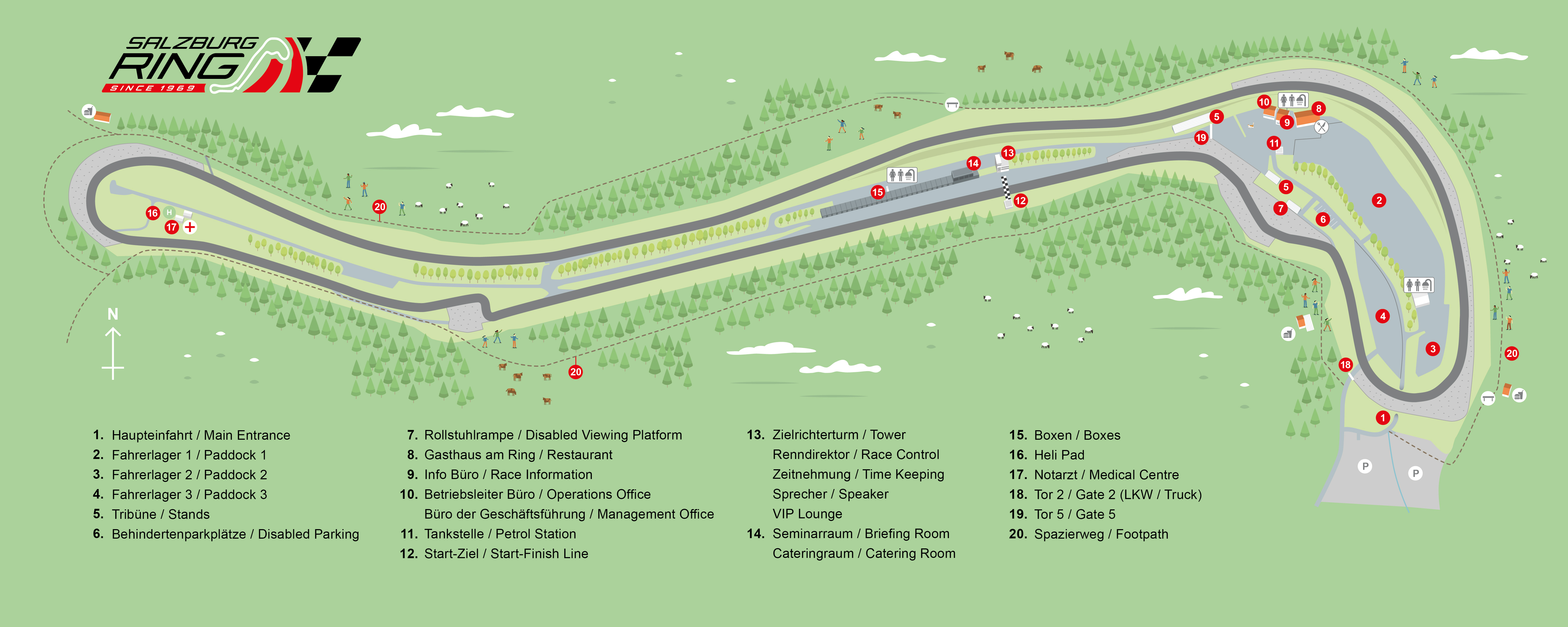 Skizze des Ringgeländes